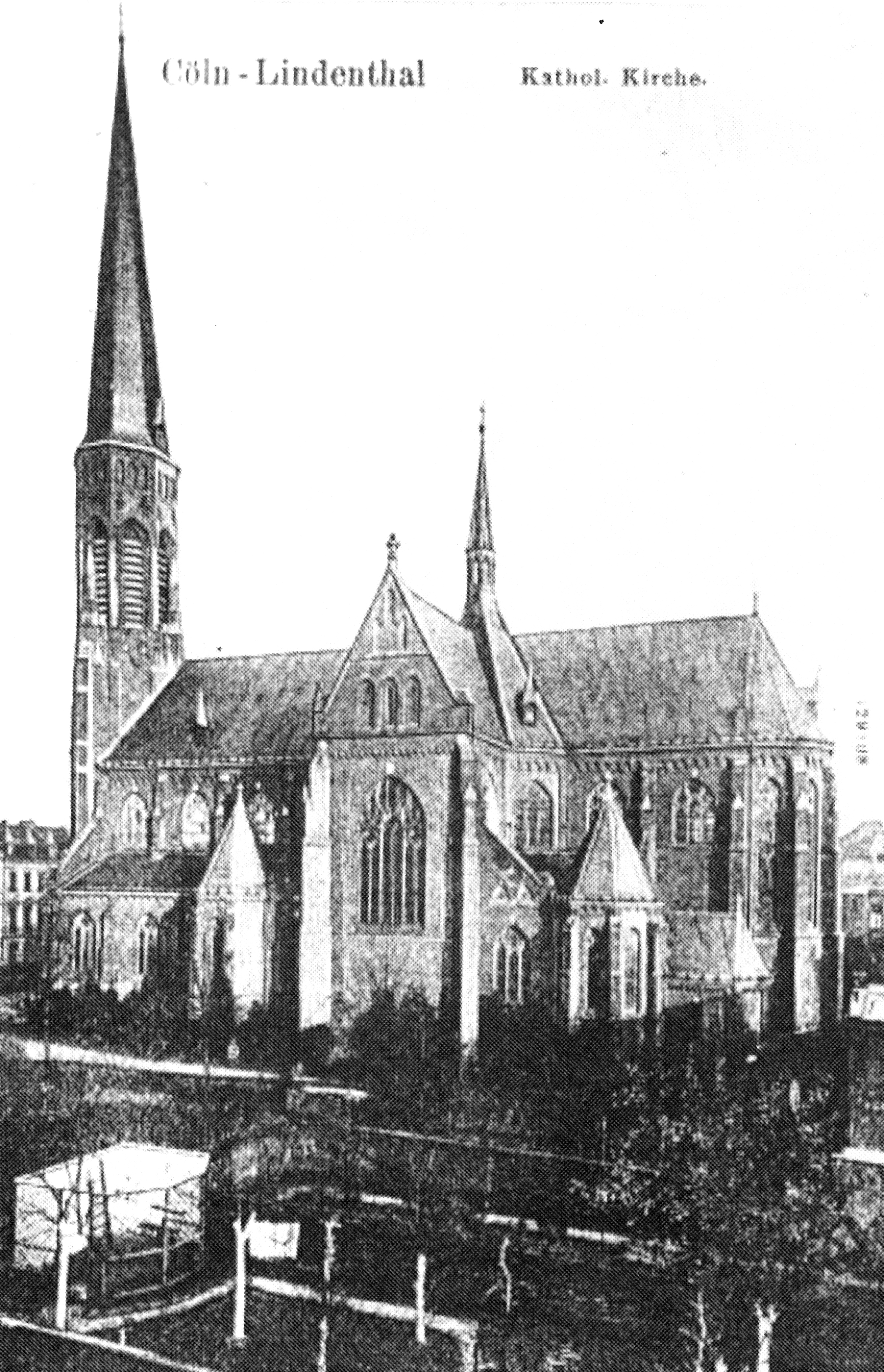 Kirche St. Stephan in Köln-Lindenthal, Anfang des 20. Jahrhunderts (Postkarte 1906 gelaufen): Architekt August Carl Lange (1834-1884)